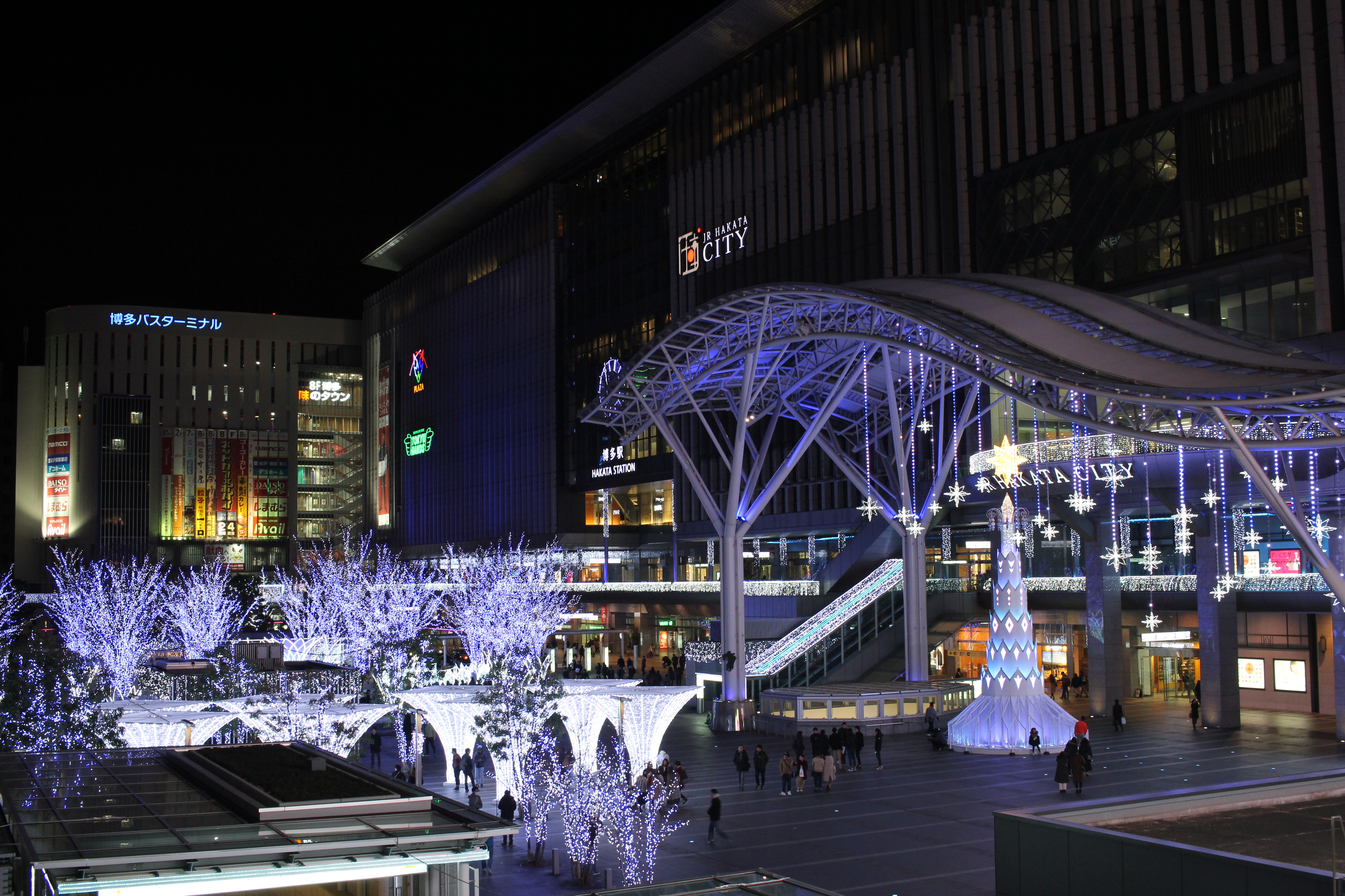 JR博多駅クリスマスイルミネーション2018 Canon EOS 60D